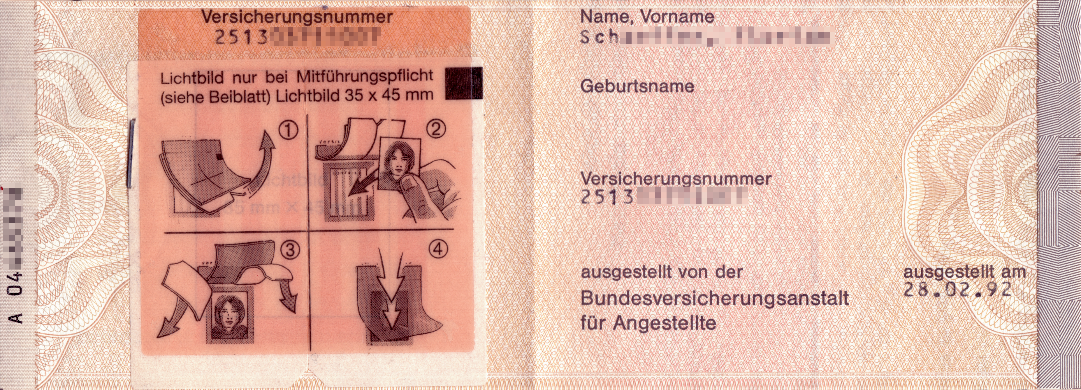 [de] Sozialversicherungsausweis Vorderseite